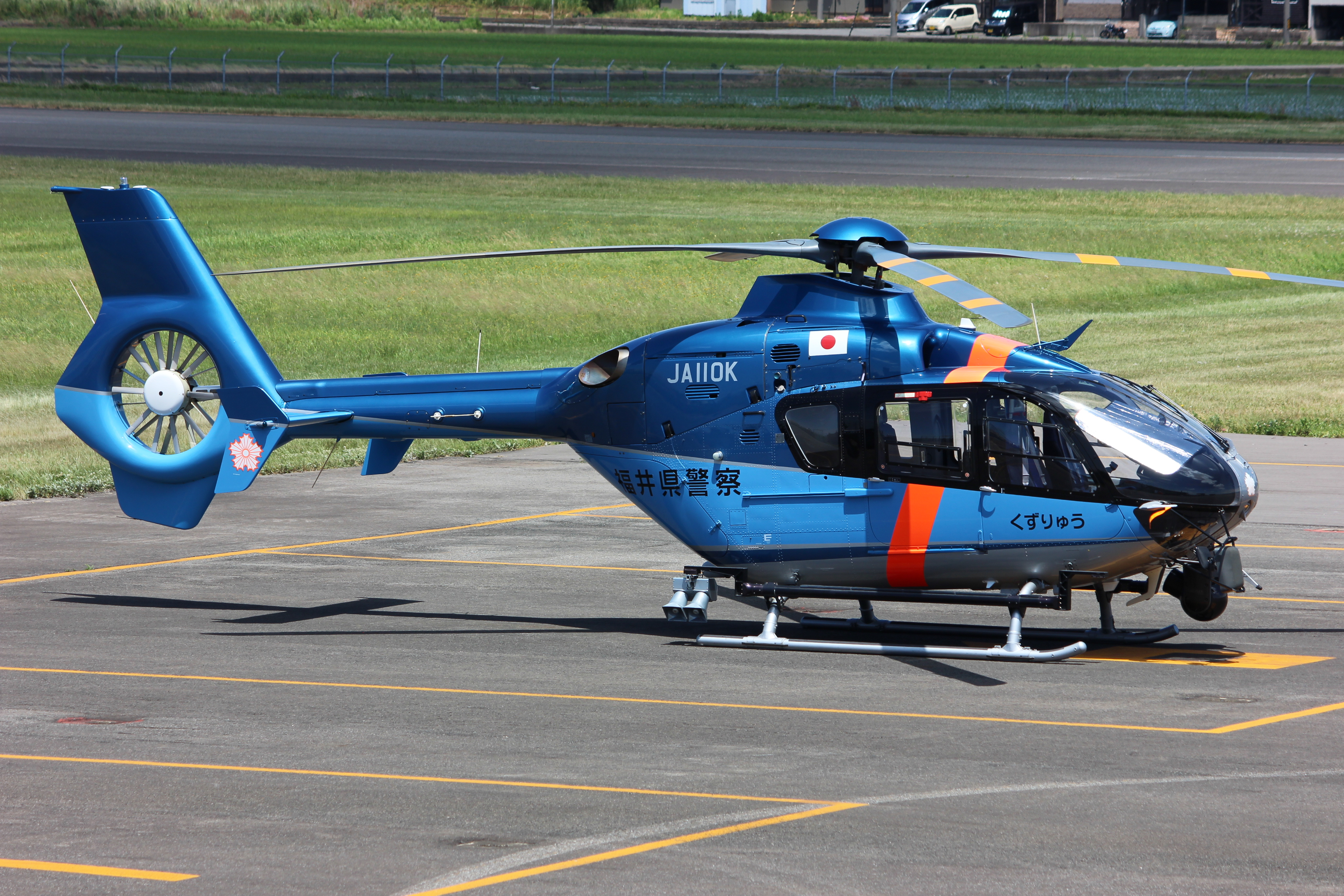 福井県警察のヘリコプター「くずりゅう」（福井空港にて撮影） Canon EOS Kiss X5